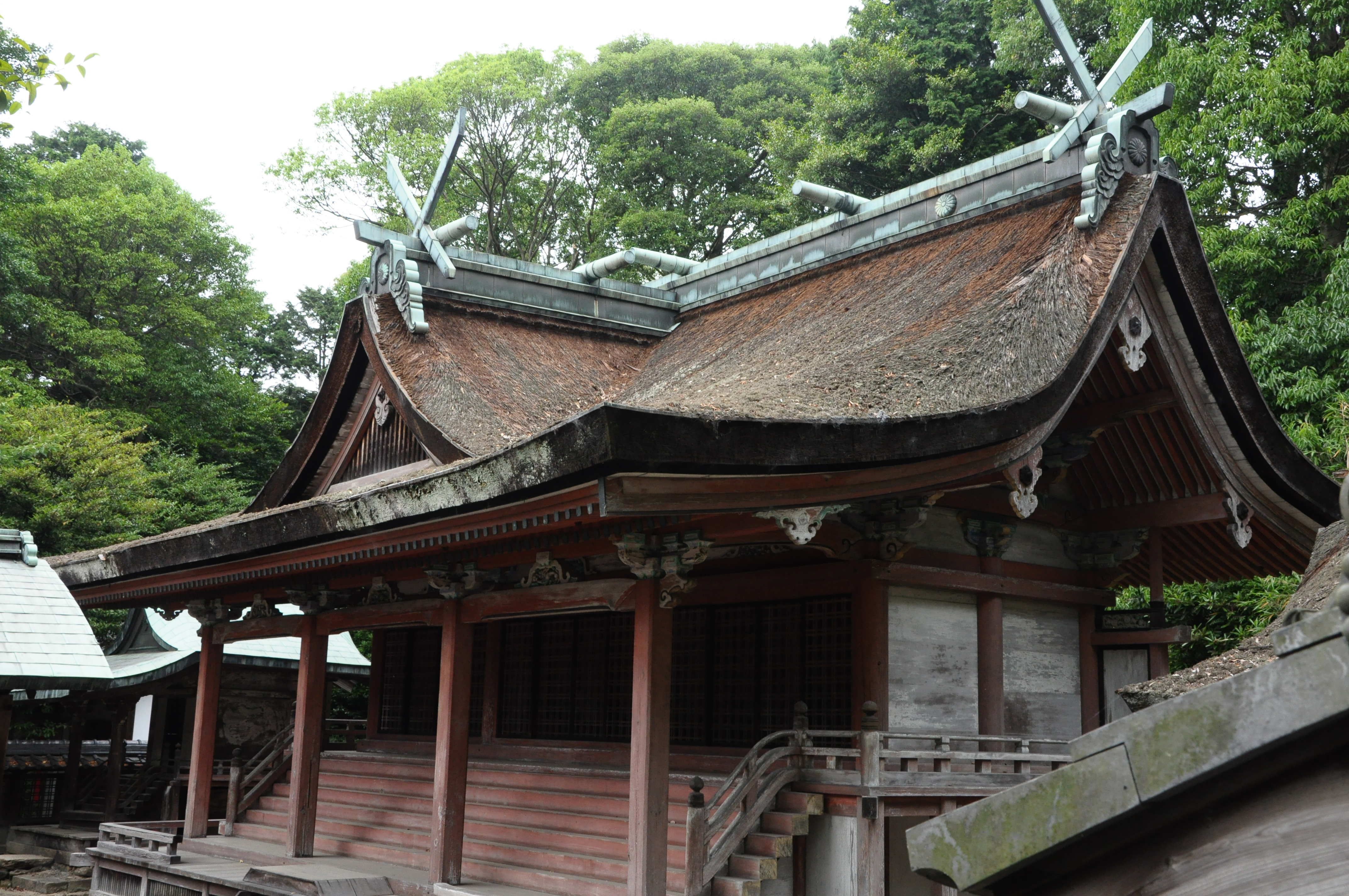 積川神社本殿